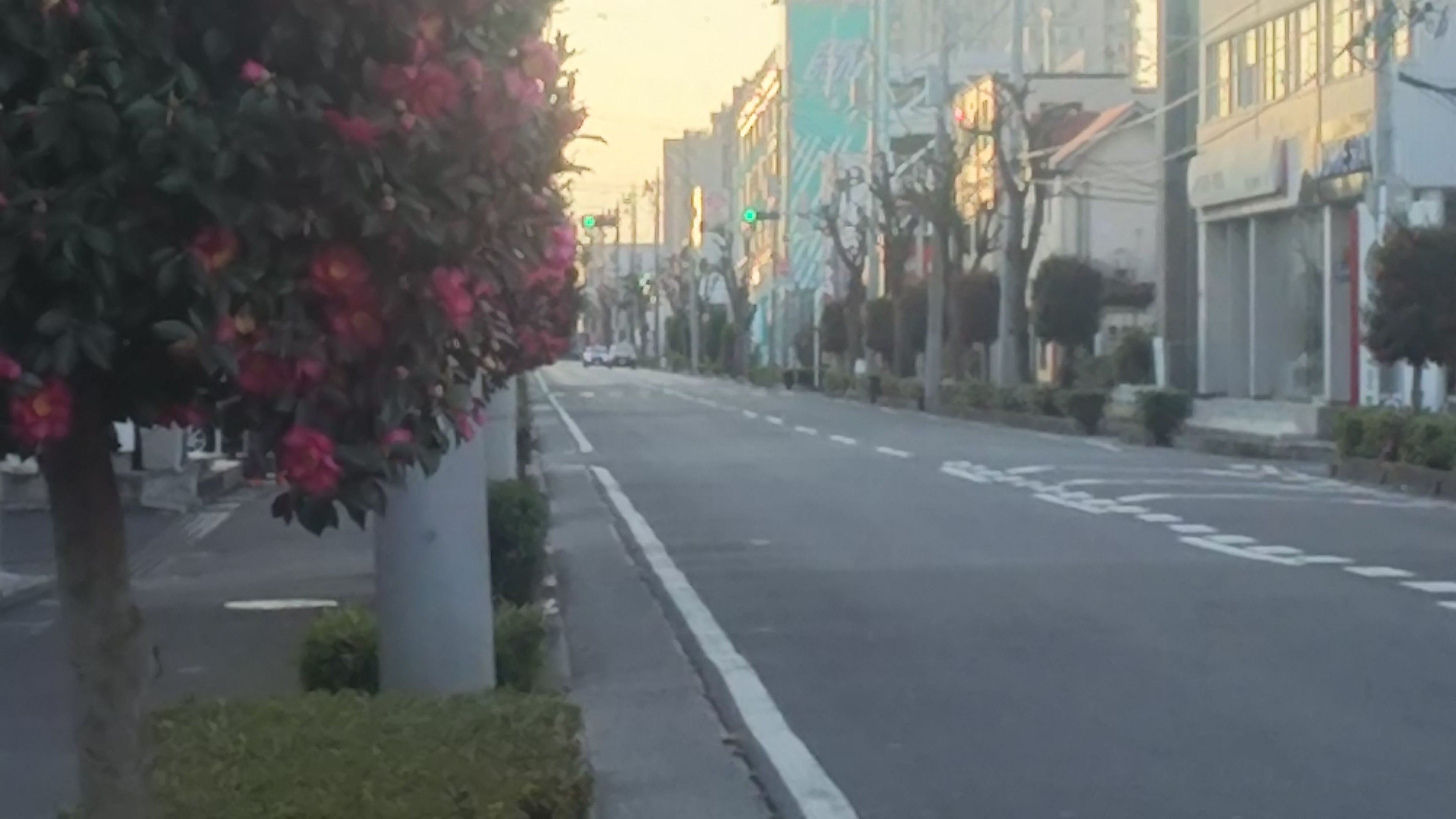 2018年12月撮影